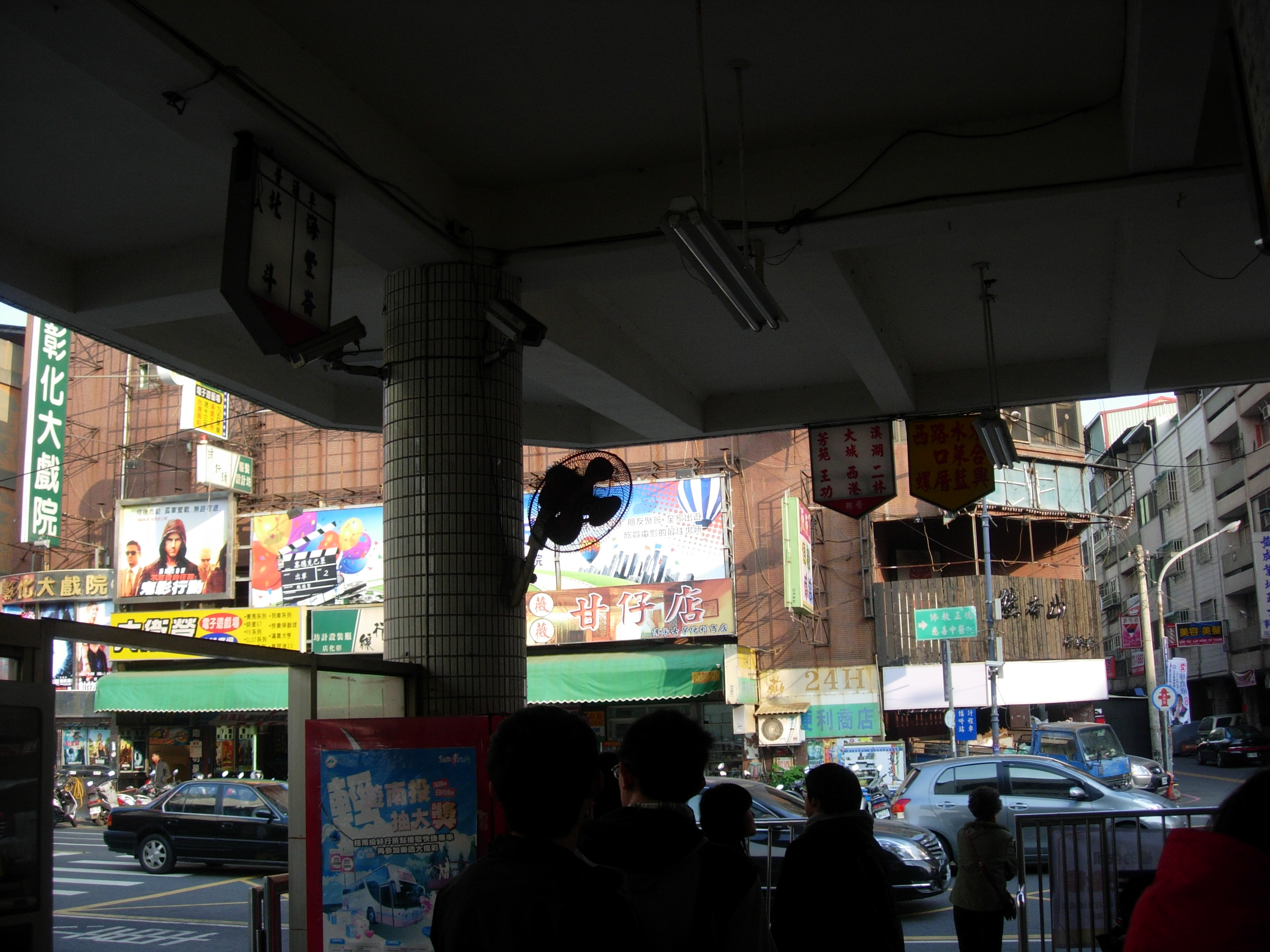 中文（台灣）: 員林客運彰化站月台